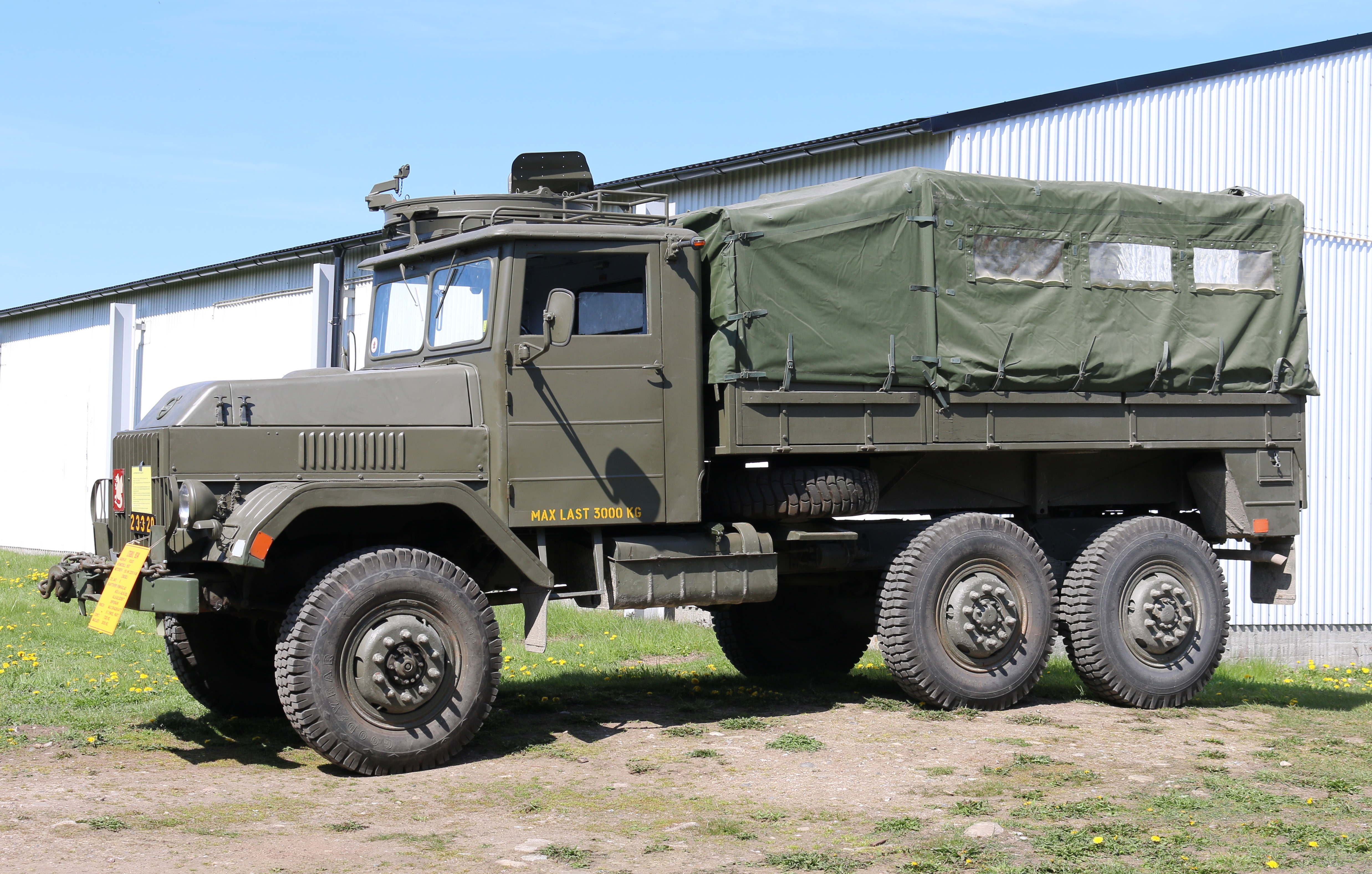 Terränglastbil 934 Artillerimuseet 2017